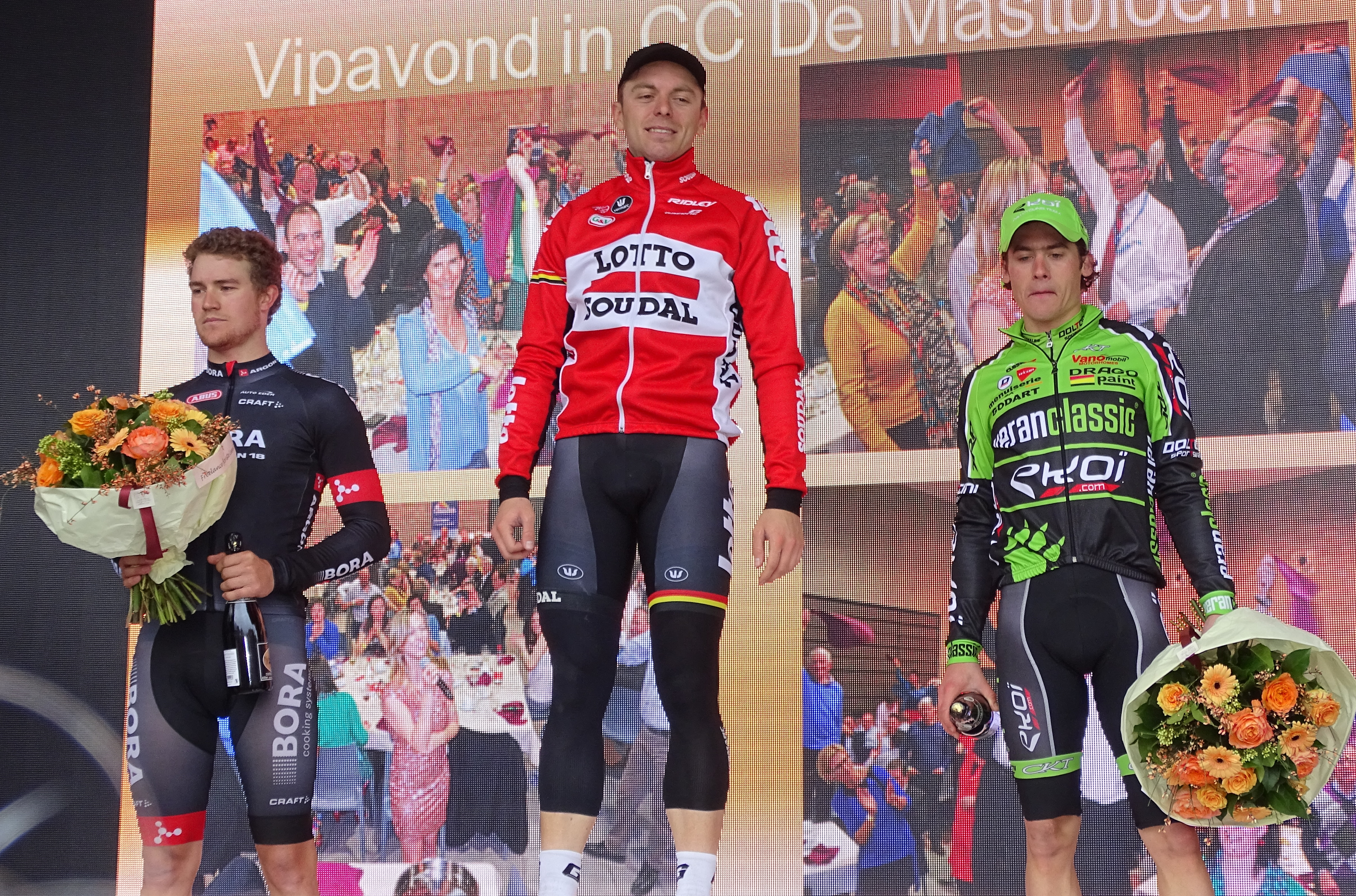 Reportage réalisé le mercredi 18 mars à l'occasion de l'arrivée de la Nokere Koerse 2015 à Nokere (Kruishoutem), Belgique.